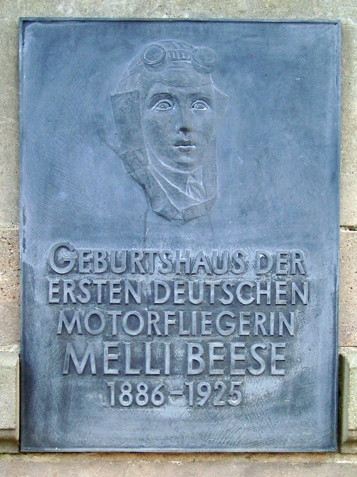 Gedenktafel am Geburtshaus von Melli Beese in Dresden-Laubegast (Österreicher Str. 84)